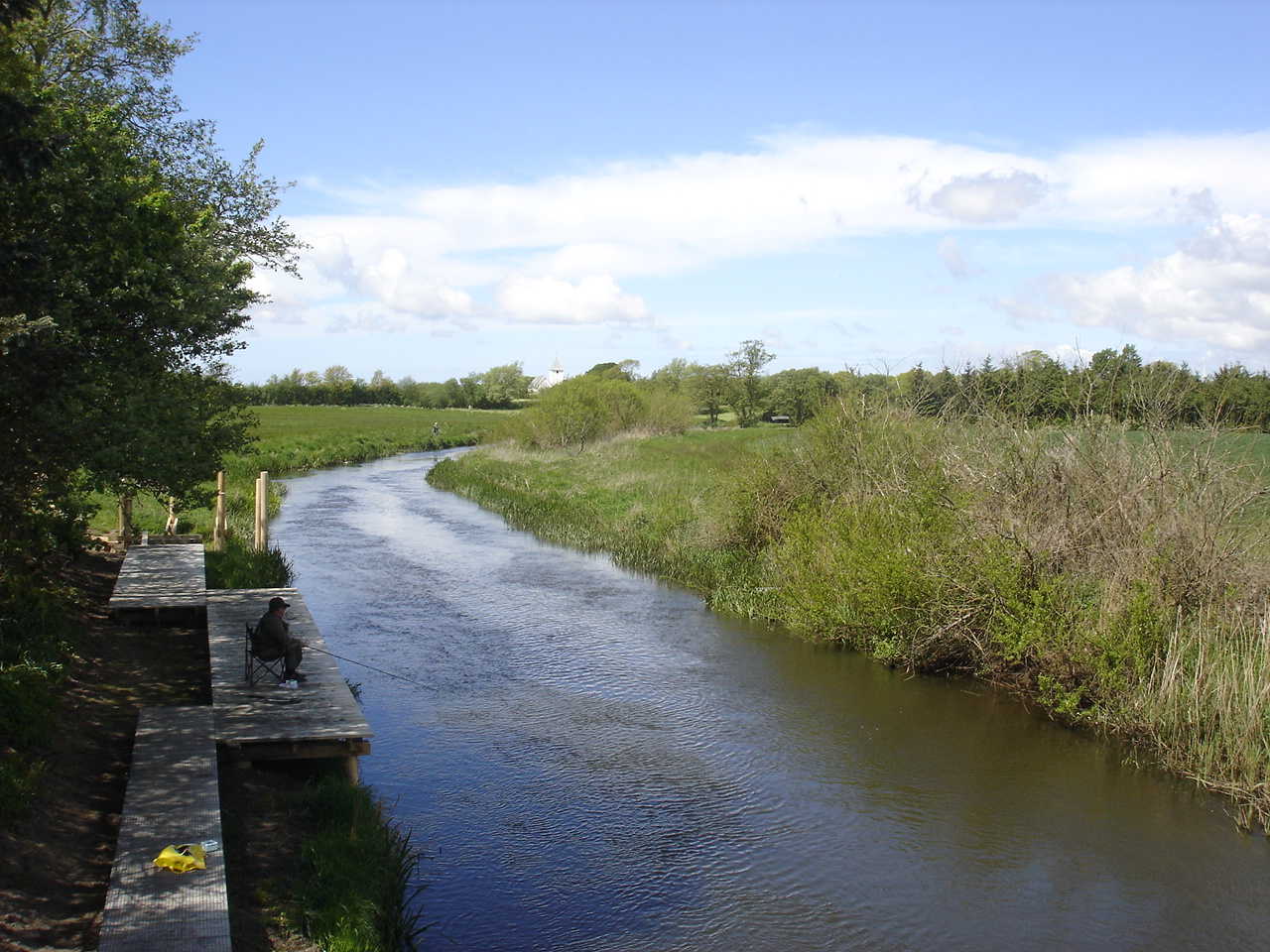 Kongeåen set mod vest fra vejen Kongeådal i Vilslev